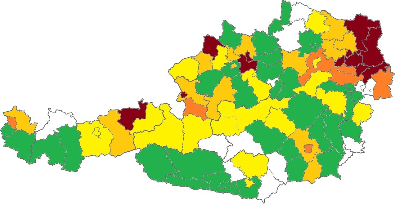 Verteilung des Namens Schulz in Österreich.